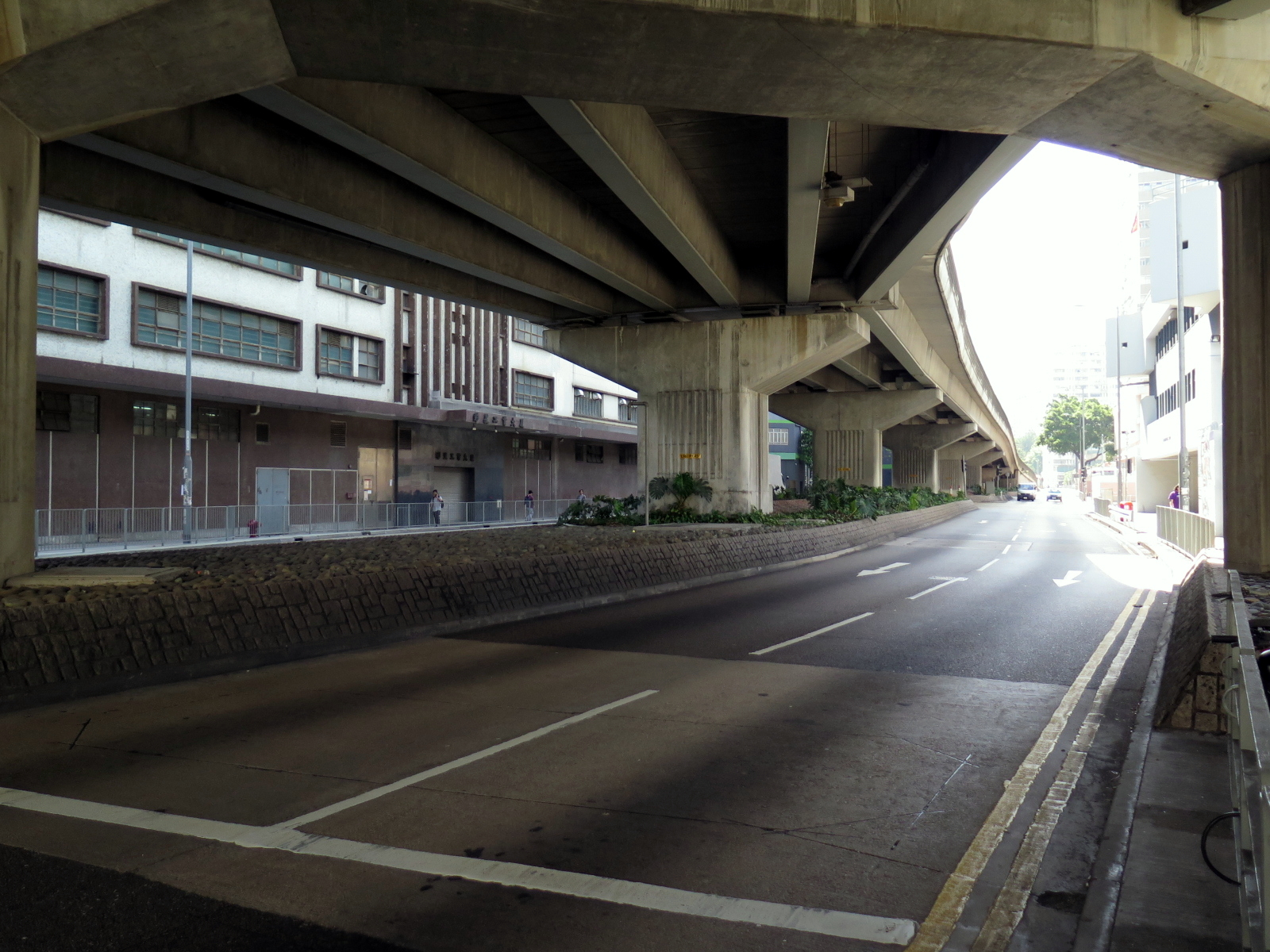 Pui To Road